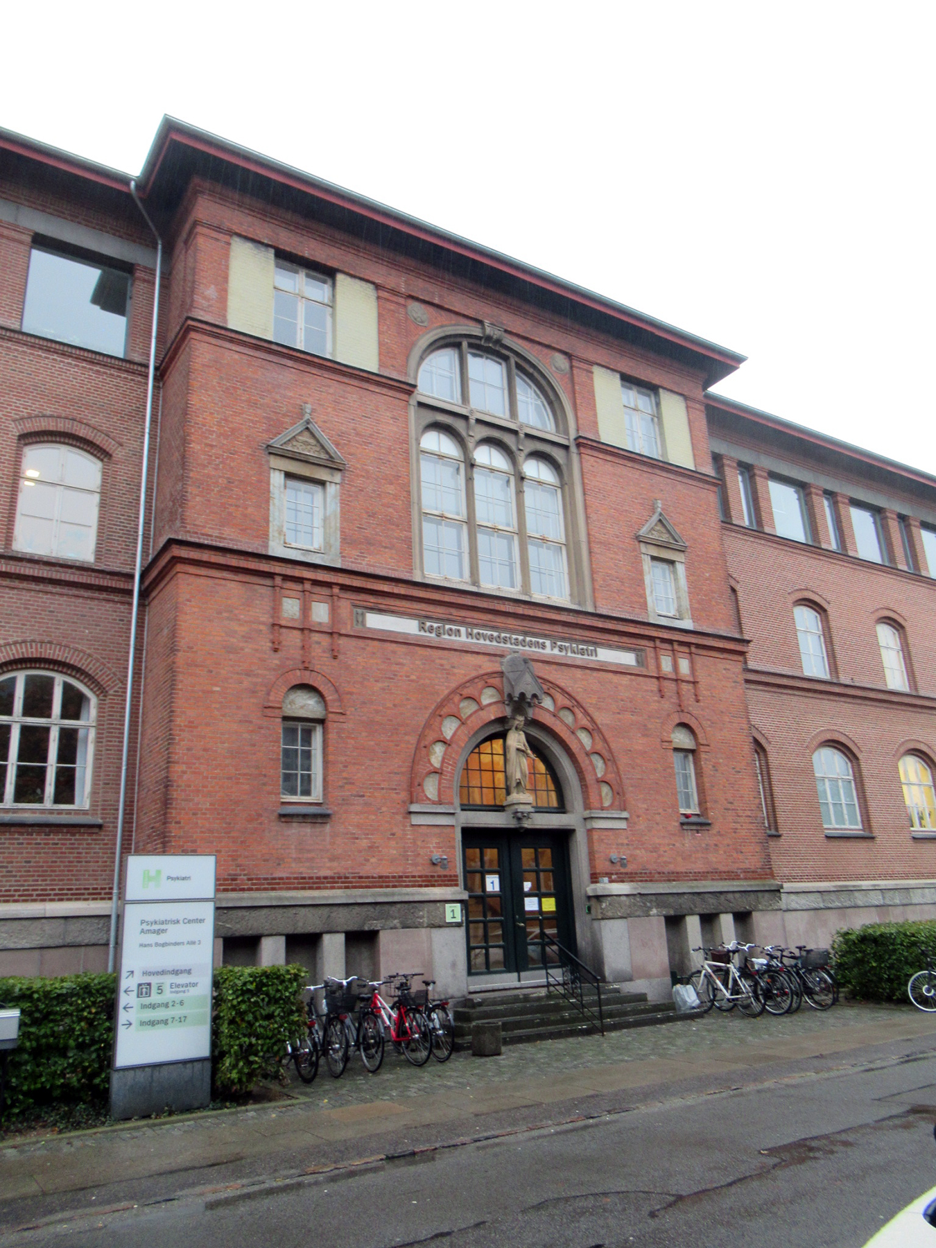 Psykiatrisk Center Amager